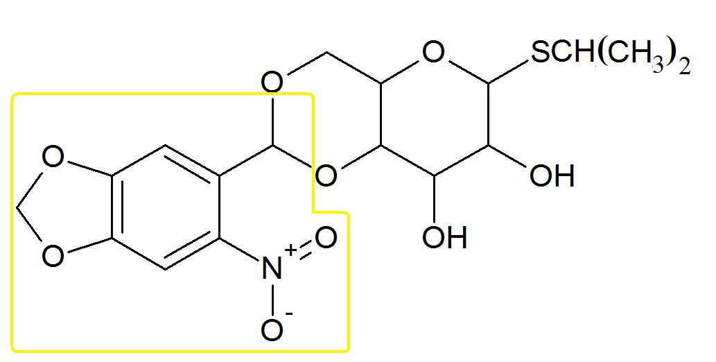 Valgus-aktiveeritav väikesemolekuline geeniekspressiooni repressorvalkude inhibiitor IPTG, mis on seotud valgustundliku kaitserühmaga (kollases kastis).